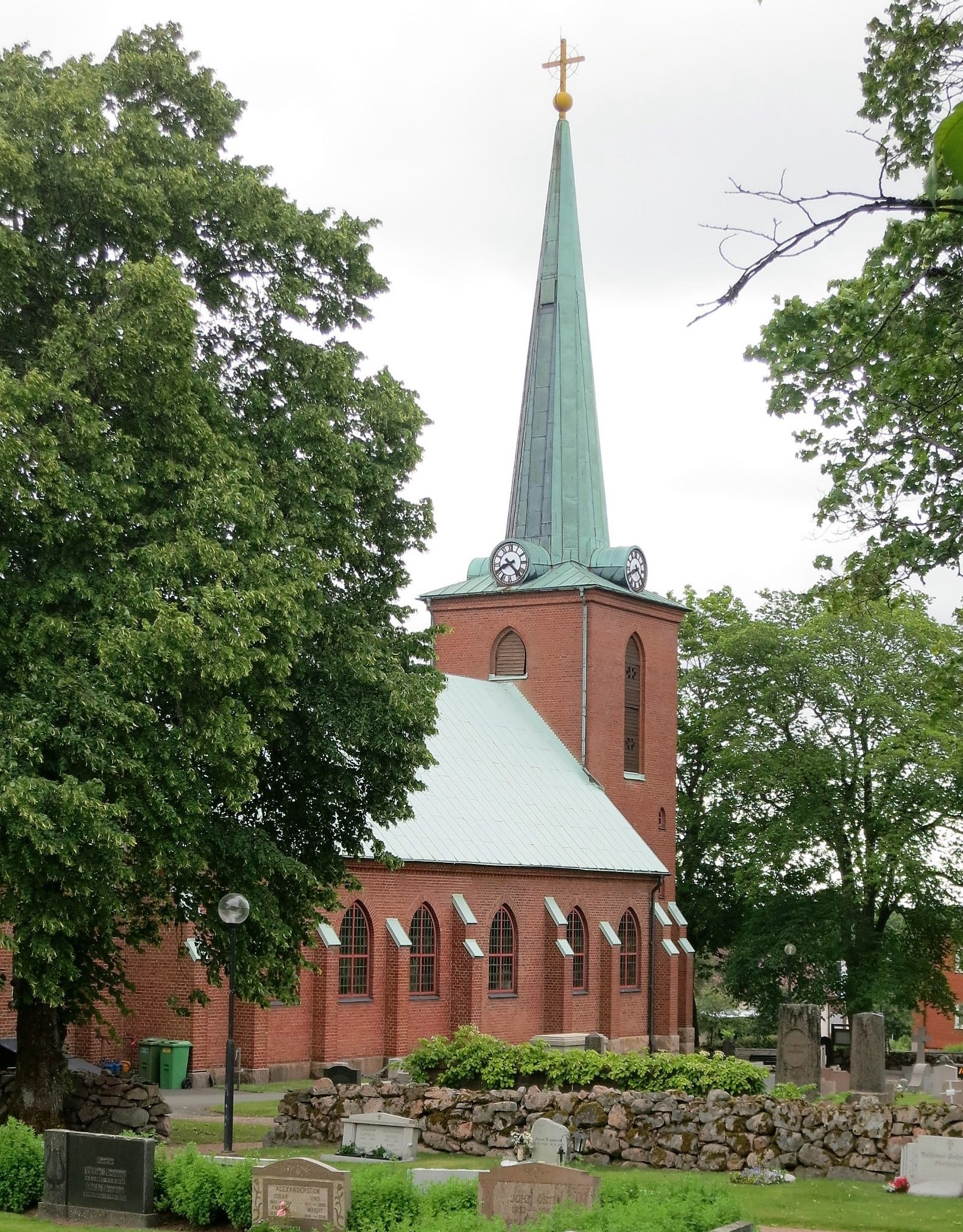 Gislaveds kyrka, Växjö stift i Småland